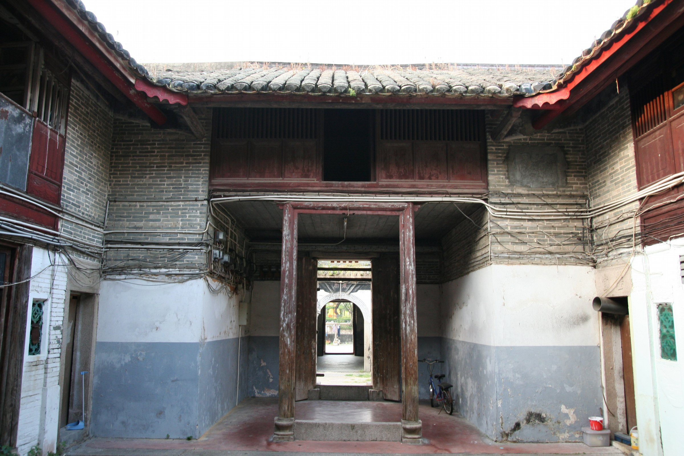 香港的圍村多設在新界, 例如 Tsang Tai Uk (曾大屋) 山下圍. Photograph author is me.